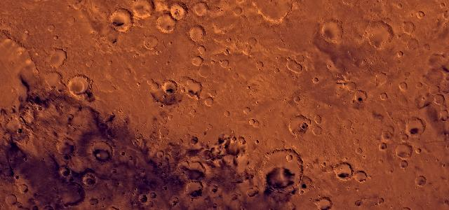 Arabia Terra auf dem Mars